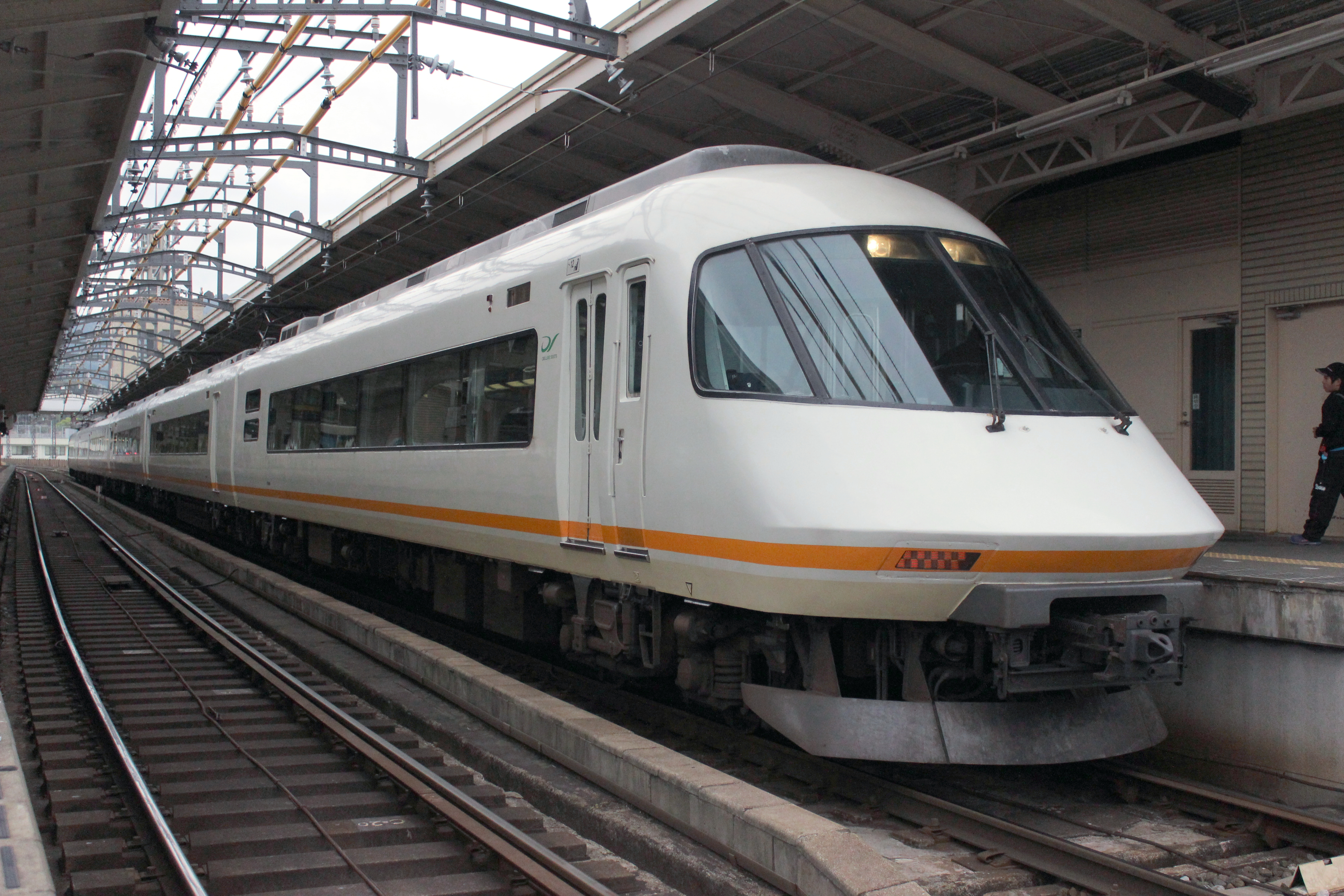 近鉄21000系 名伊運用